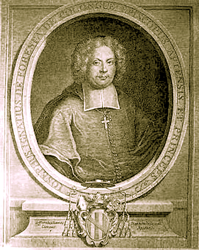 Joseph-Ignace de Foresta, évêque d'Apt durant la grande peste de 1720